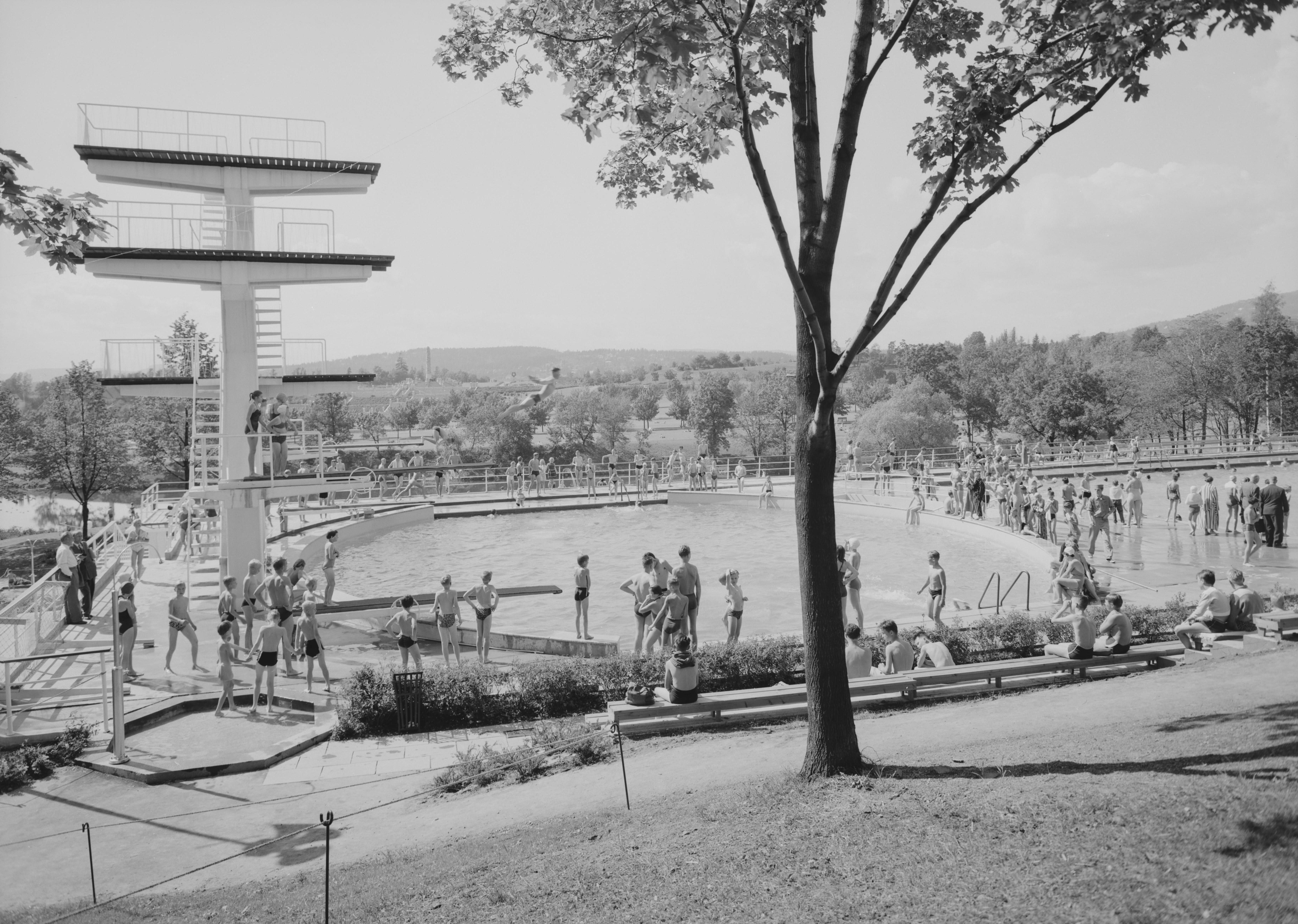 Bildet er hentet fra Nasjonalbibliotekets bildesamling Frognerparken,Oslo, Oslo, Oslo